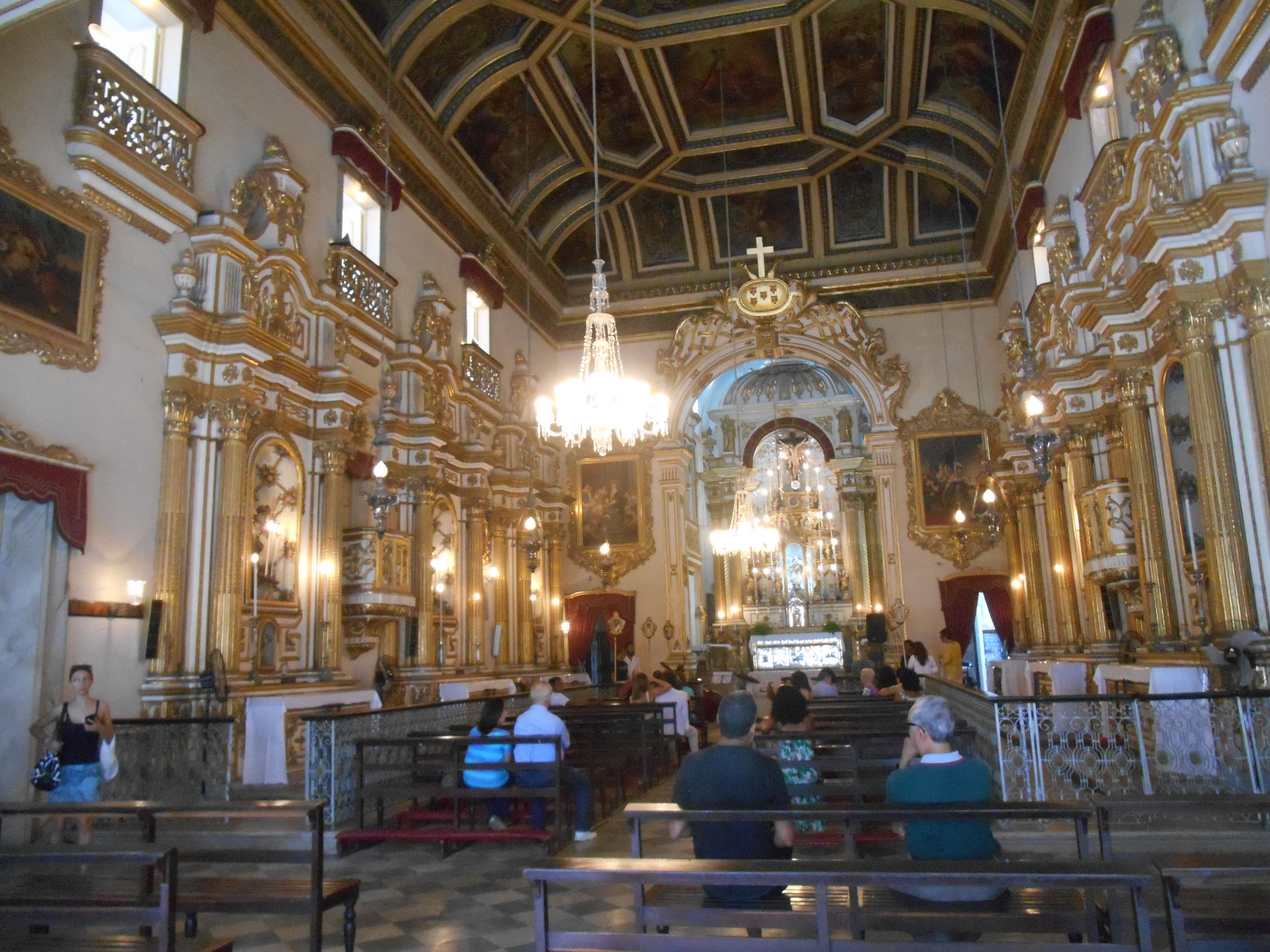 Igreja da Ordem Terceira de São Francisco